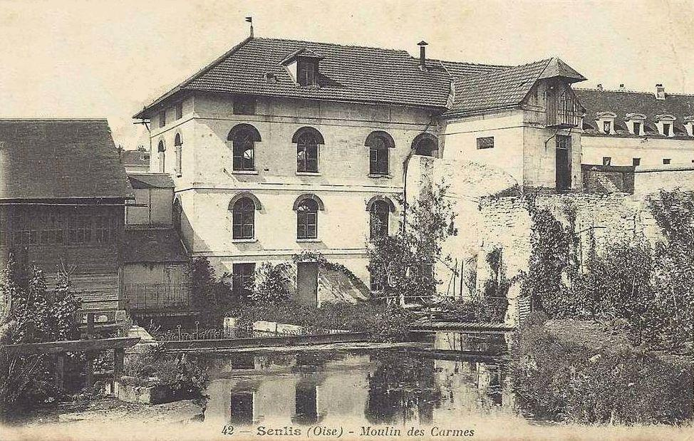 Le moulin des Carmes, attenant au couvent des Carmes et lui appartenant, a été démoli après les destructions subies lors de la bataille de Senlis, le 2 septembre 1914. Au Moyen Âge, l'ordre des Bonshommes avait déjà un moulin en ce lieu.